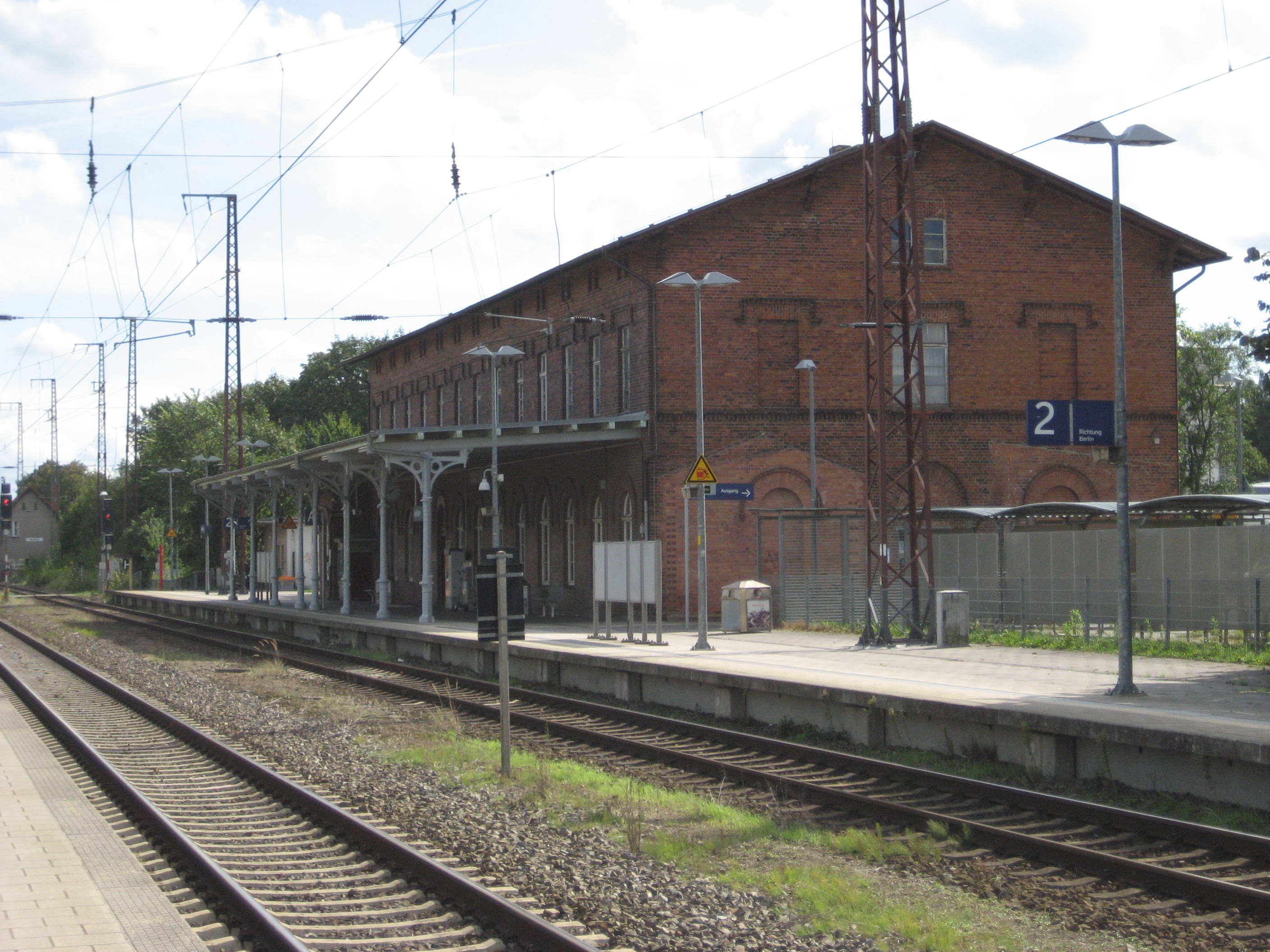 Empfangsgebäude des Bahnhofs Anklam von der Gleisseite her gesehen.